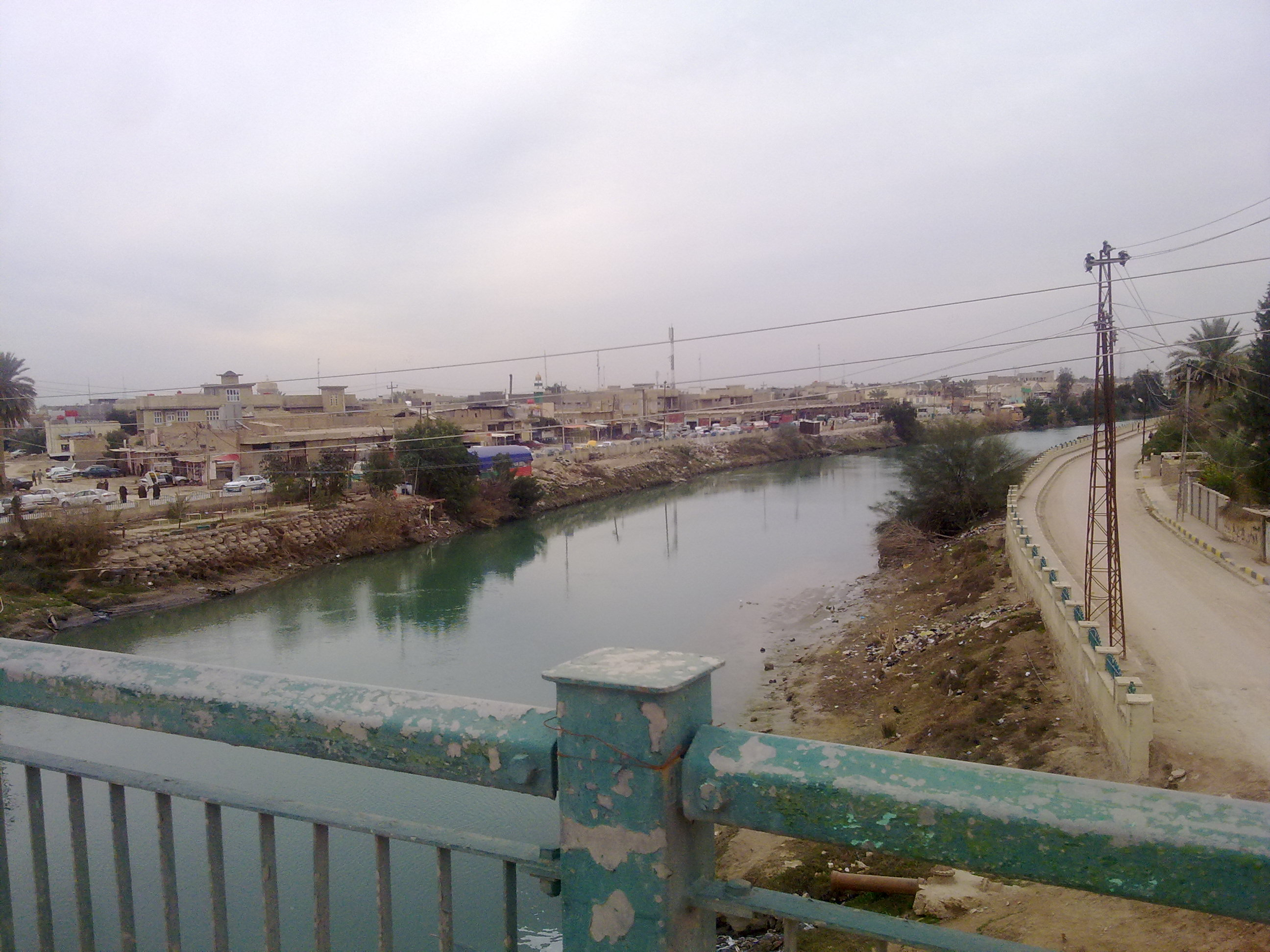 شط الشامية